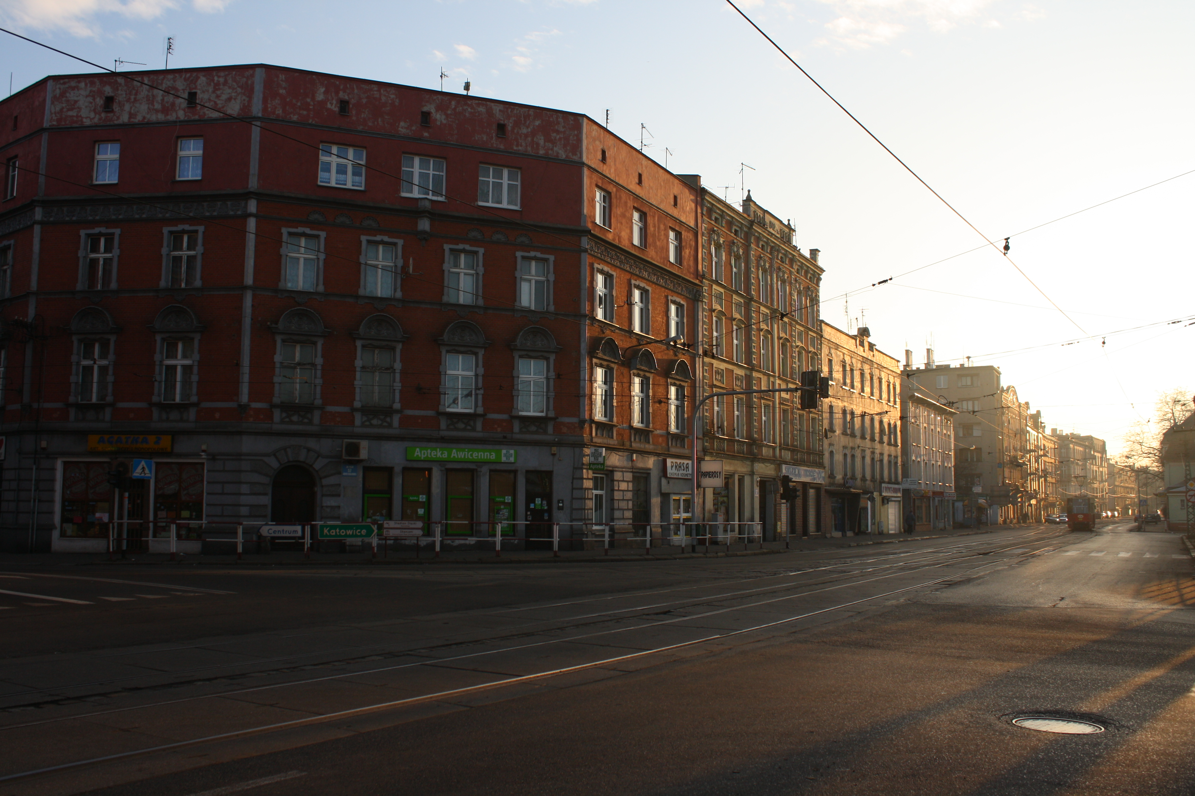 Chorzów Batory (d. Wielkie Hajduki) ul. Armii Krajowej